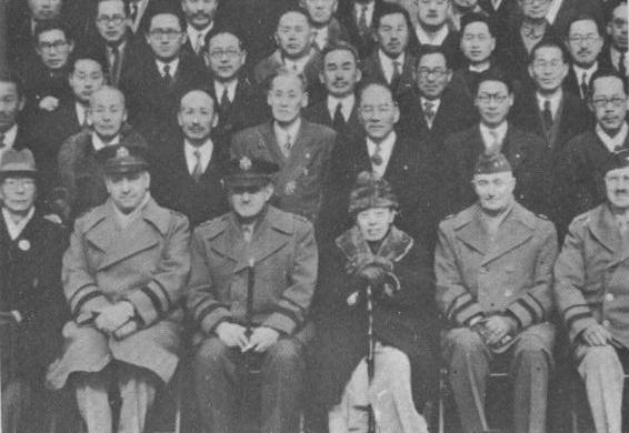 1947.01 南朝鮮過渡立法議院諸議員(1946.12 - 1948.08)